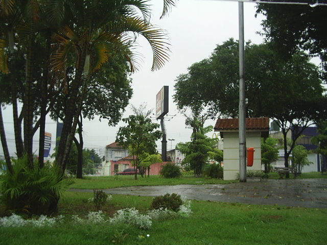 Praça pública, em São Caetano do Sul.